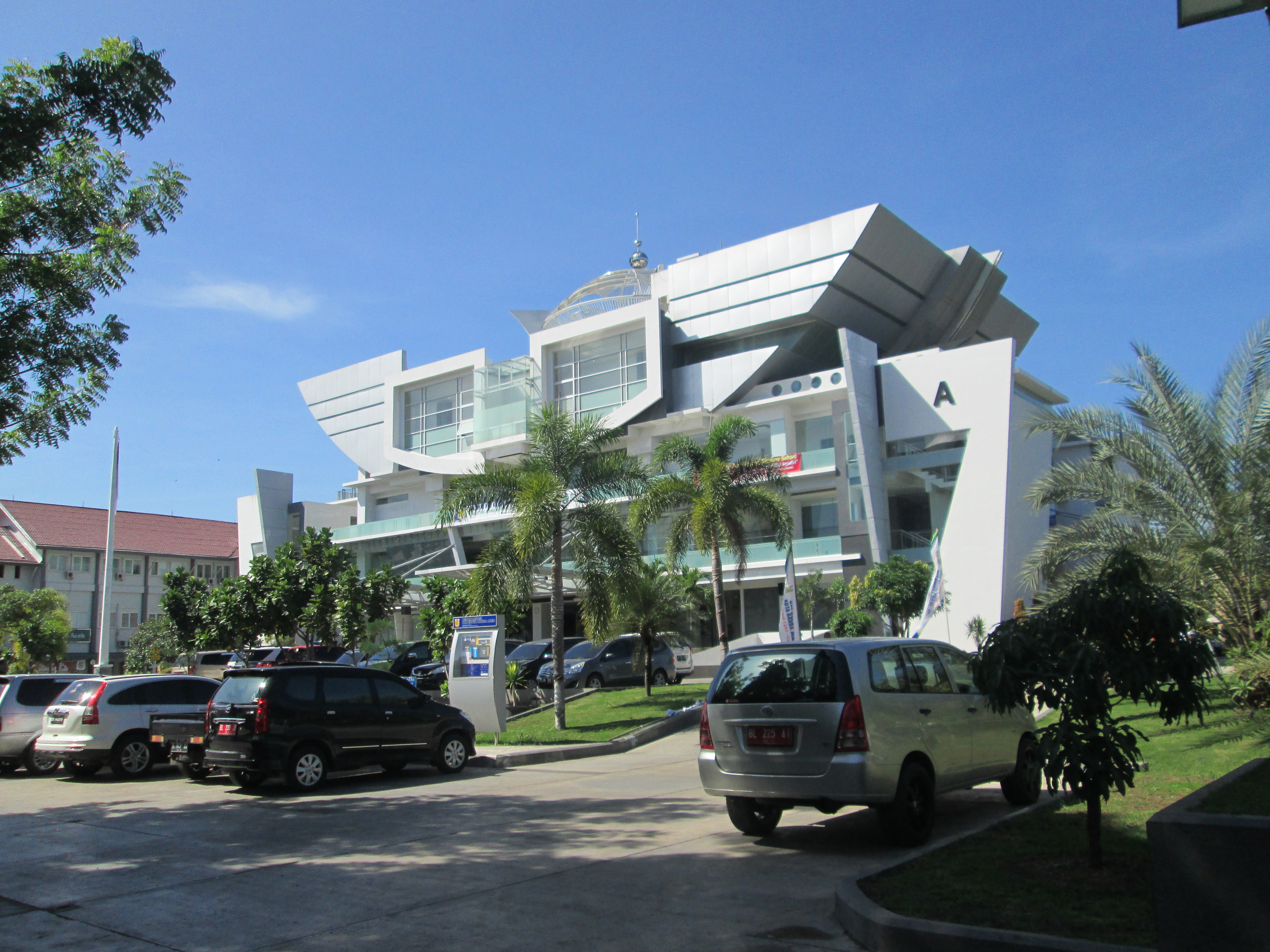 Kantor Walikota Banda Aceh